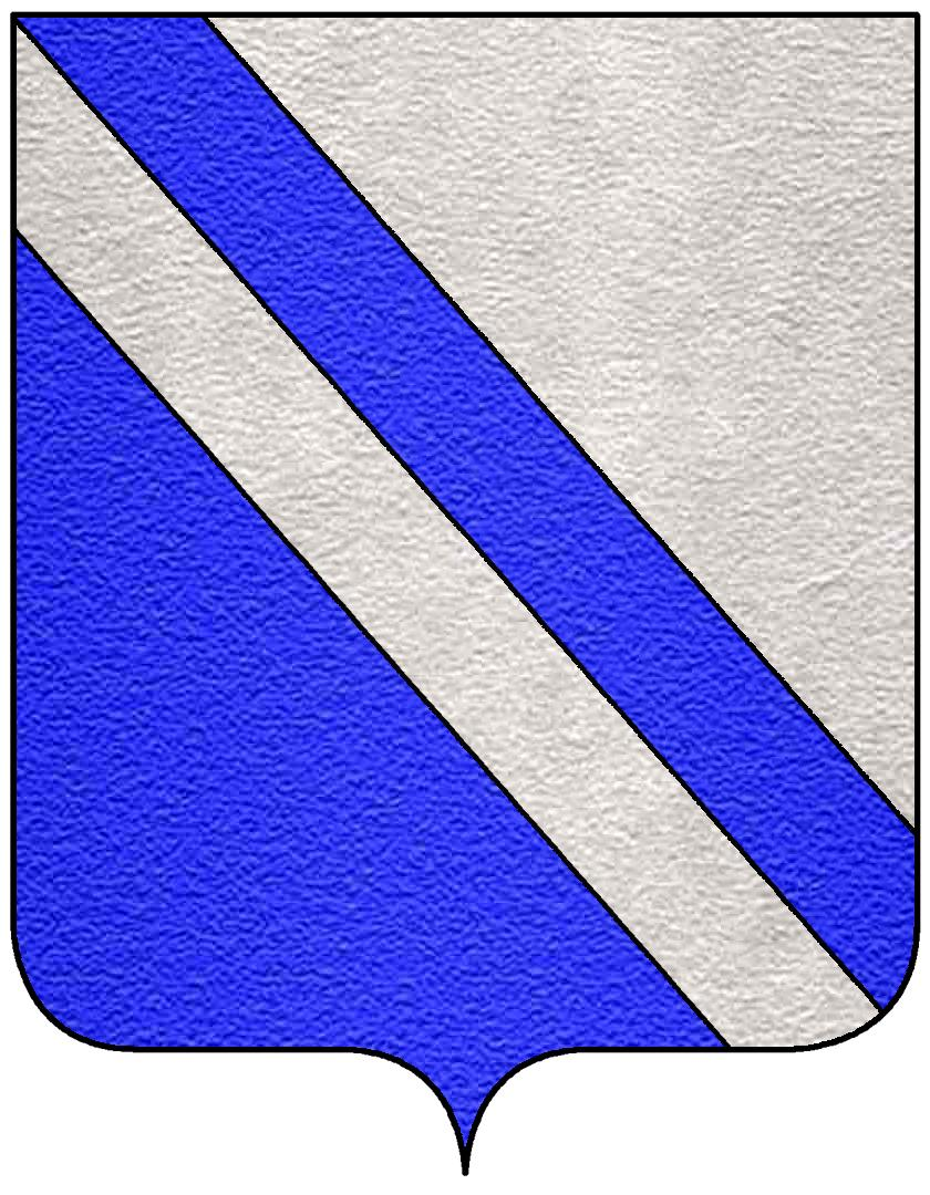 Stemma della famiglia Alamanni